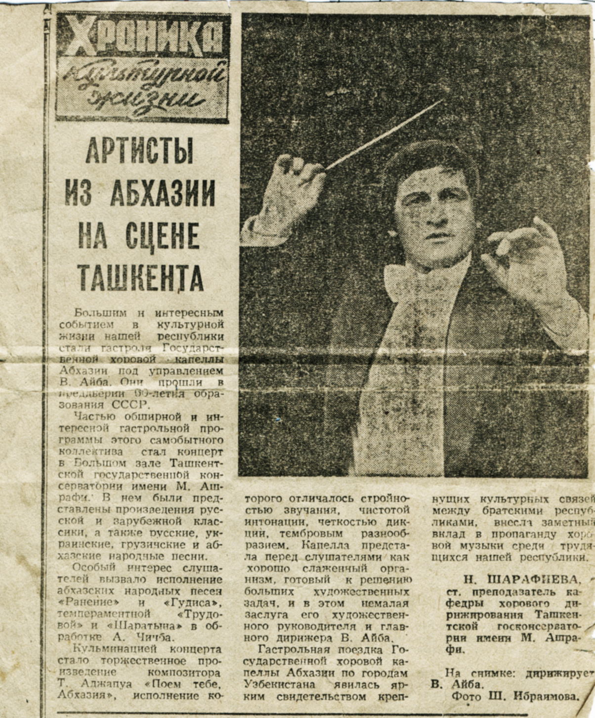 1983 год